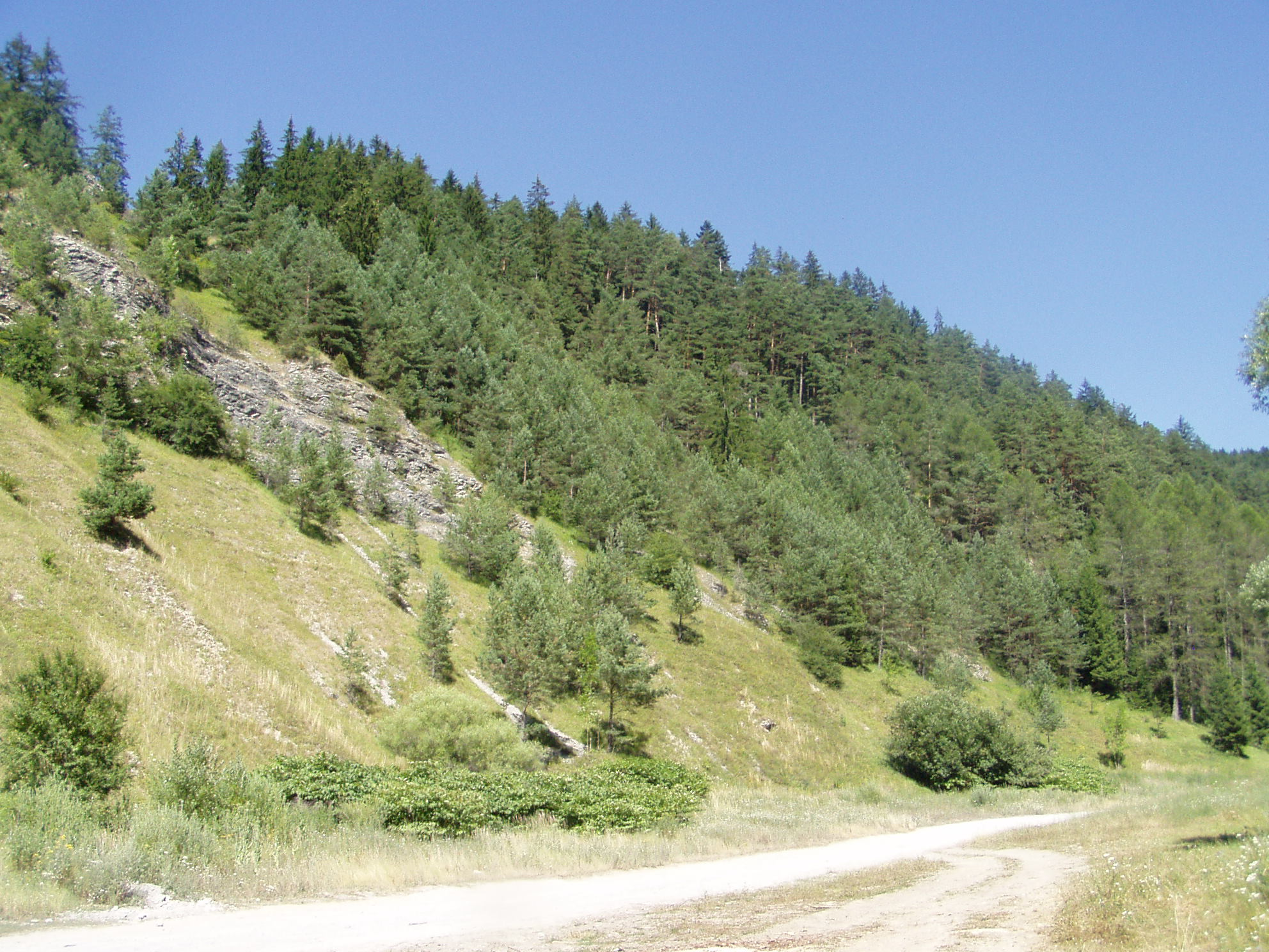 Záver doliny